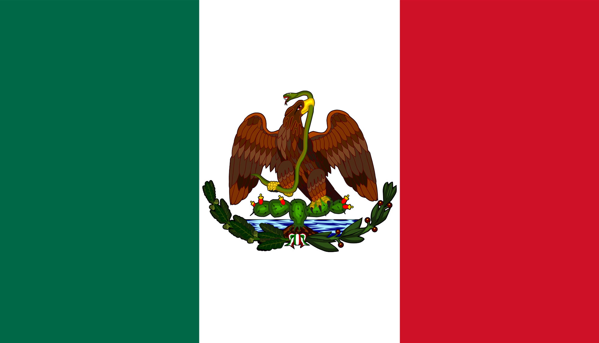 Bandera utilizada en la primera etapa del porfiriato.